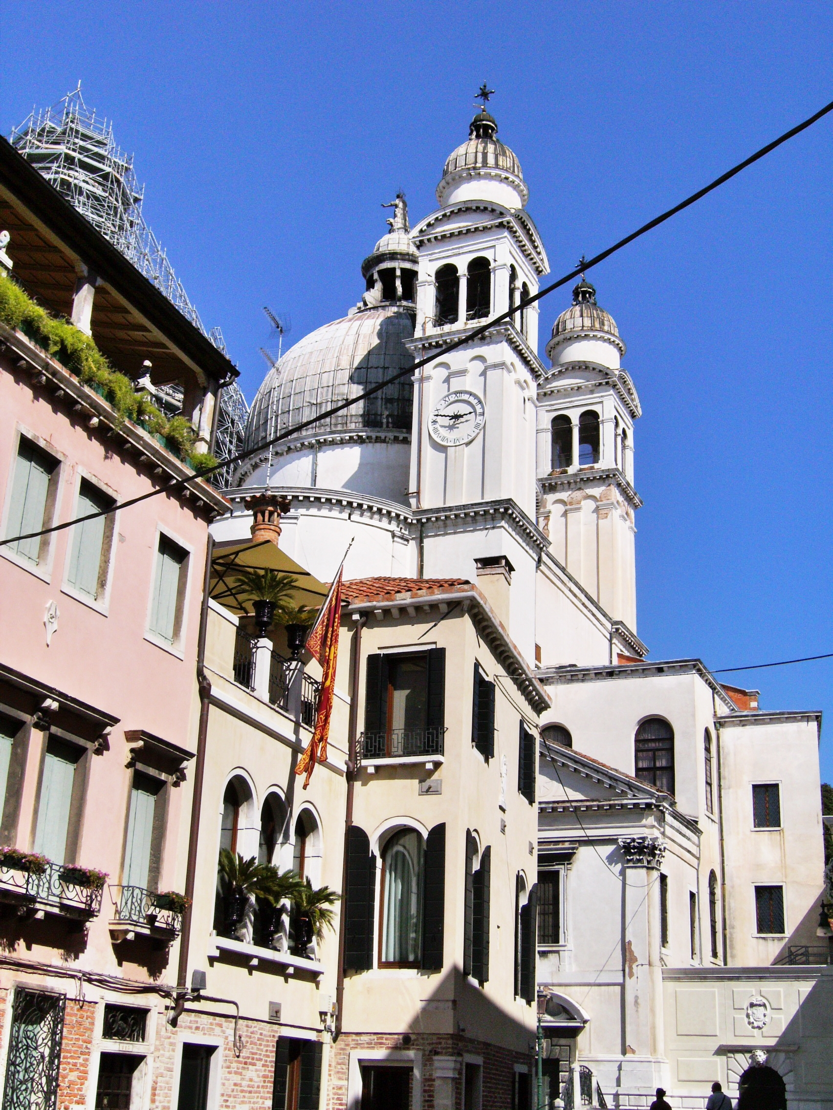 Basilica di Santa Maria della Salute from Rio tera dei Catecumeni